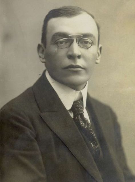 Alojzij Remec (1886-1952), Slovene writer.